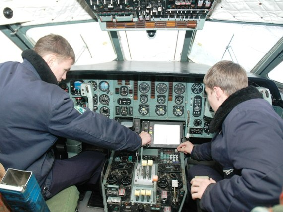 Изучение самолета на практике